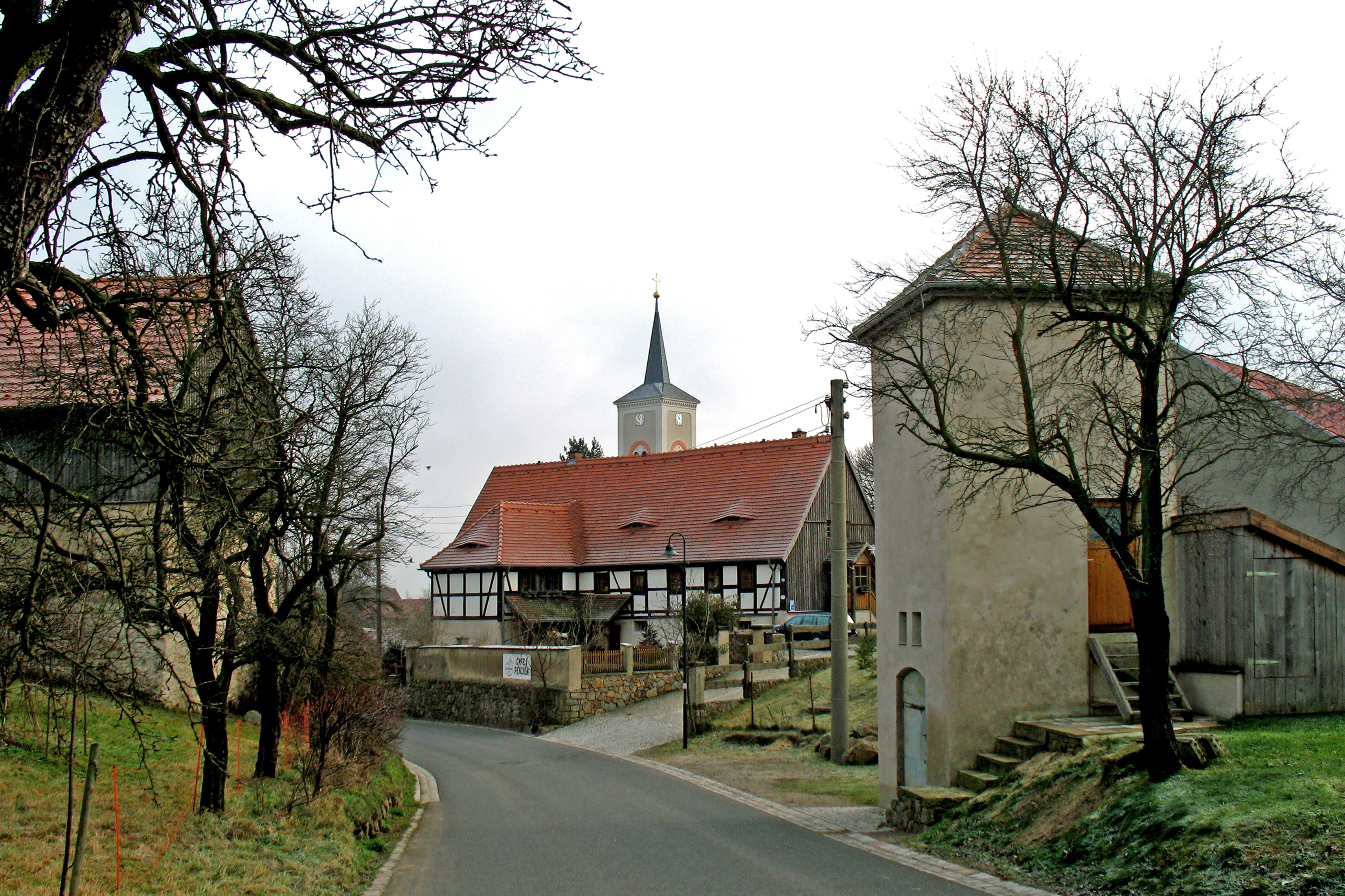 View of Naustadt (Klipphausen) (Blick entlang der Scharfenberger Straße zur Kirche)